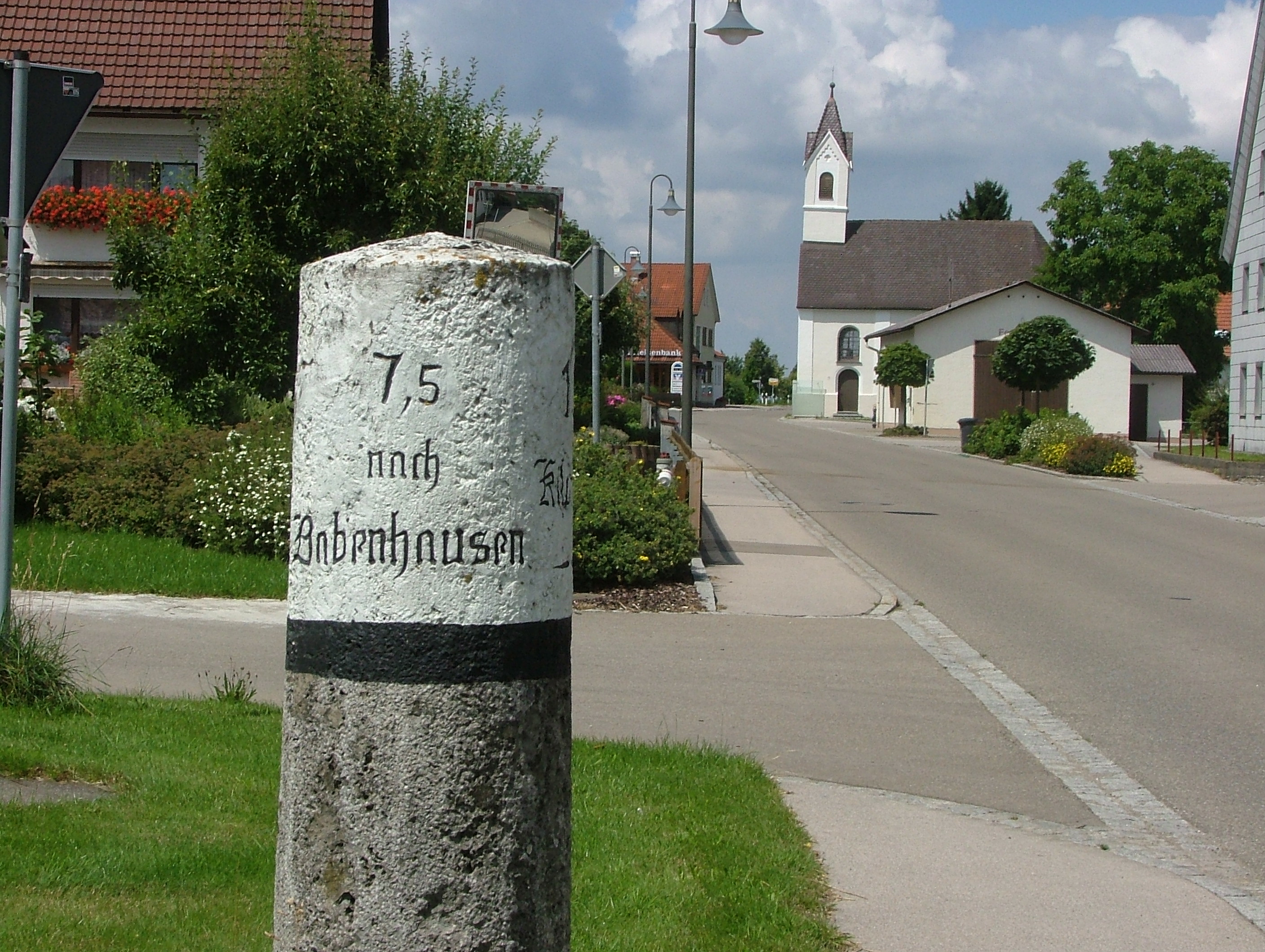 Egg an der Günz